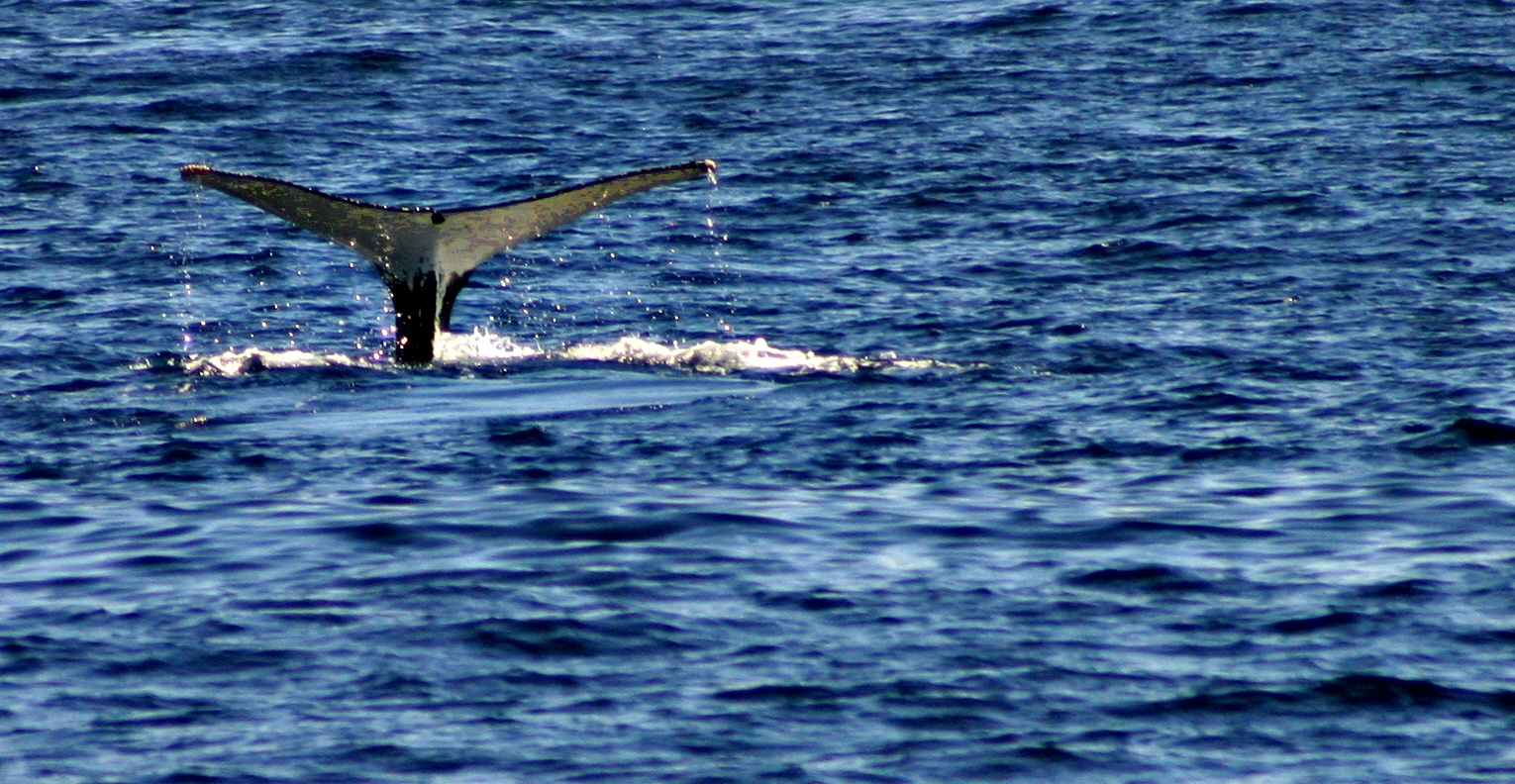 Западно от Фриментъл, Австралия